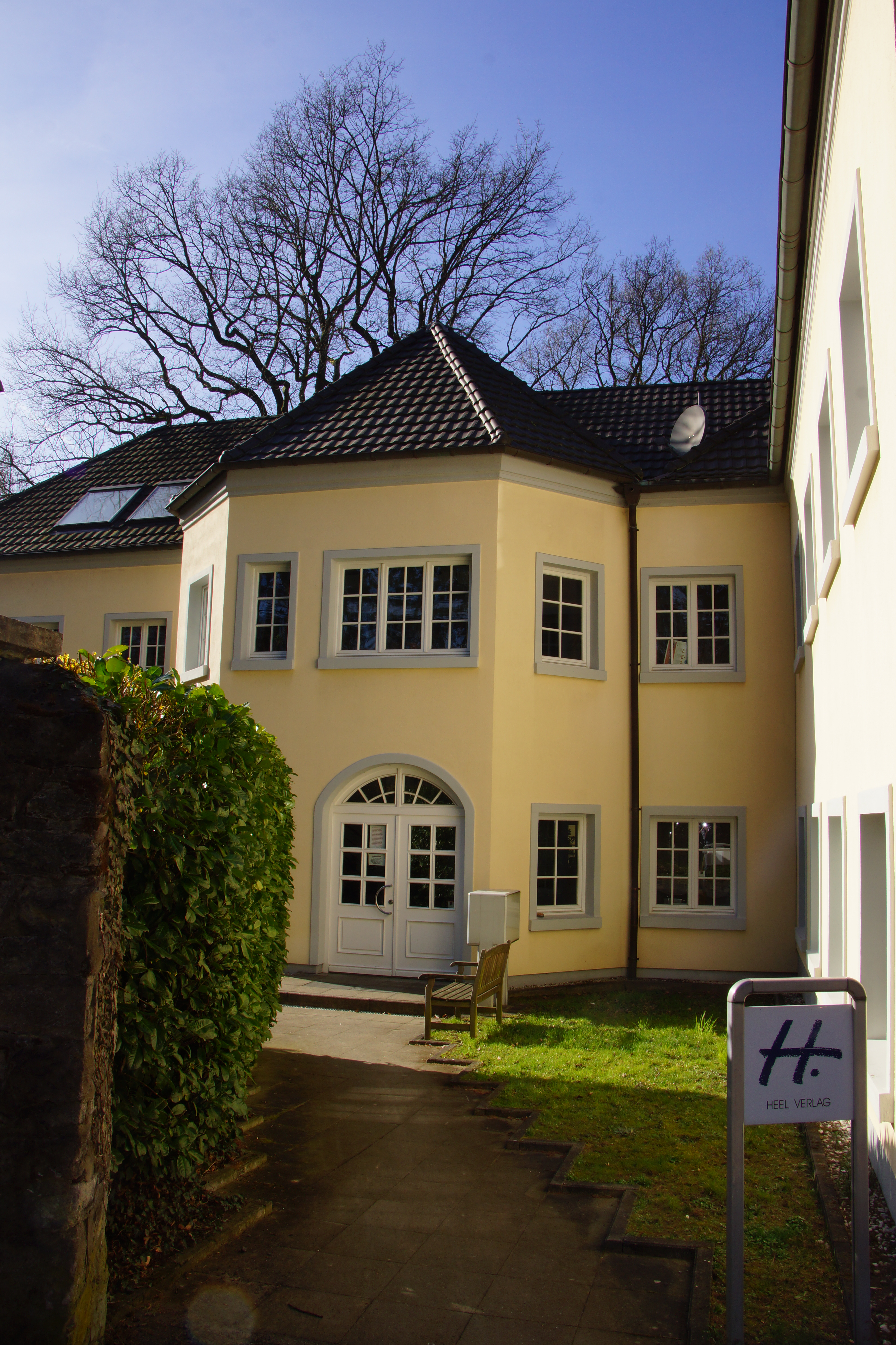 Gut Pottscheid Königswinter, Eingang Heel Verlag